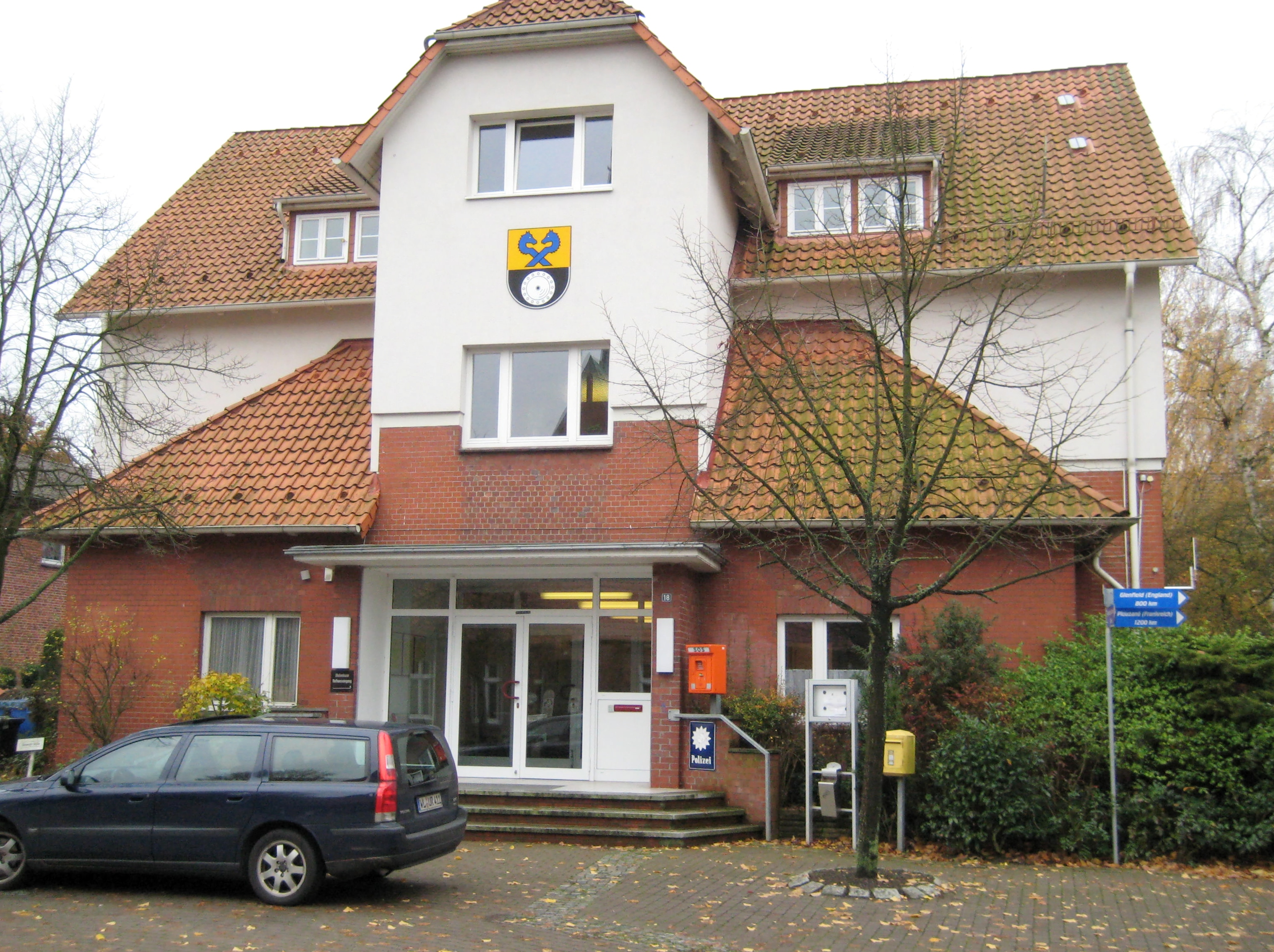 Rathaus (zuvor: jüngeres Schulgebäude) in Stelle (Landkreis Harburg) in Niedersachsen, Deutschland